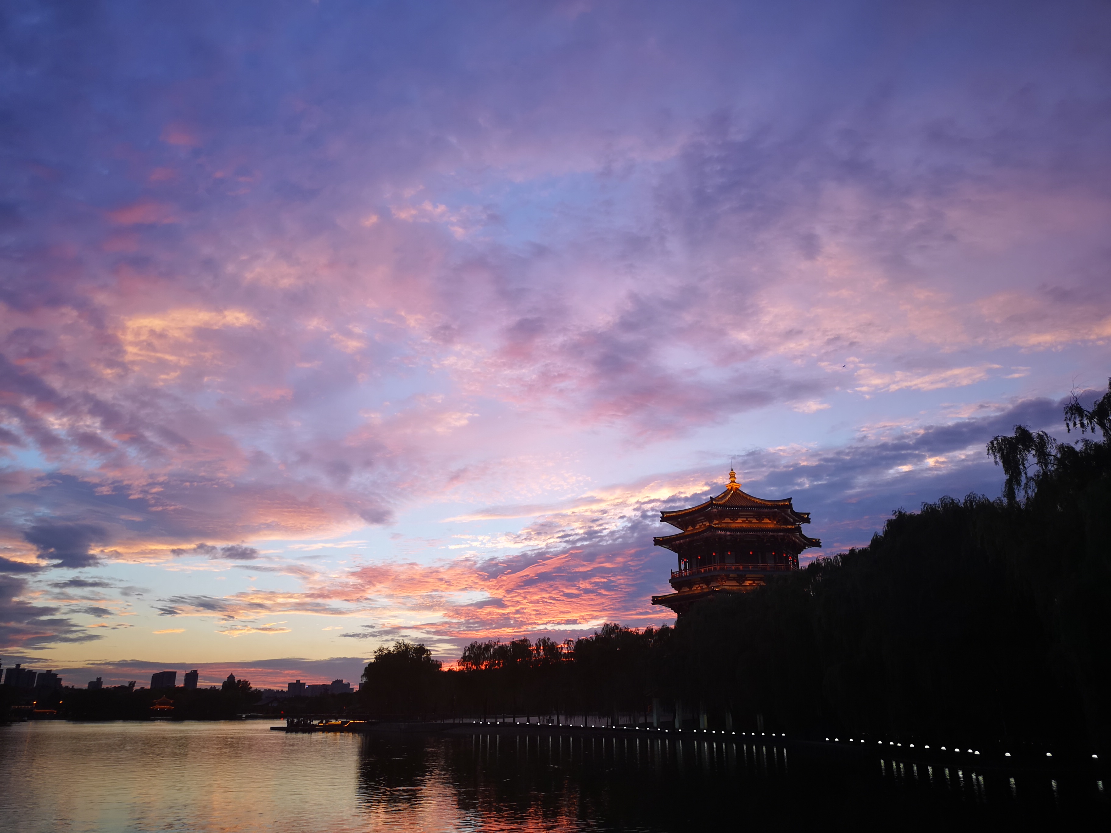 中文（中国大陆）: 大唐芙蓉园